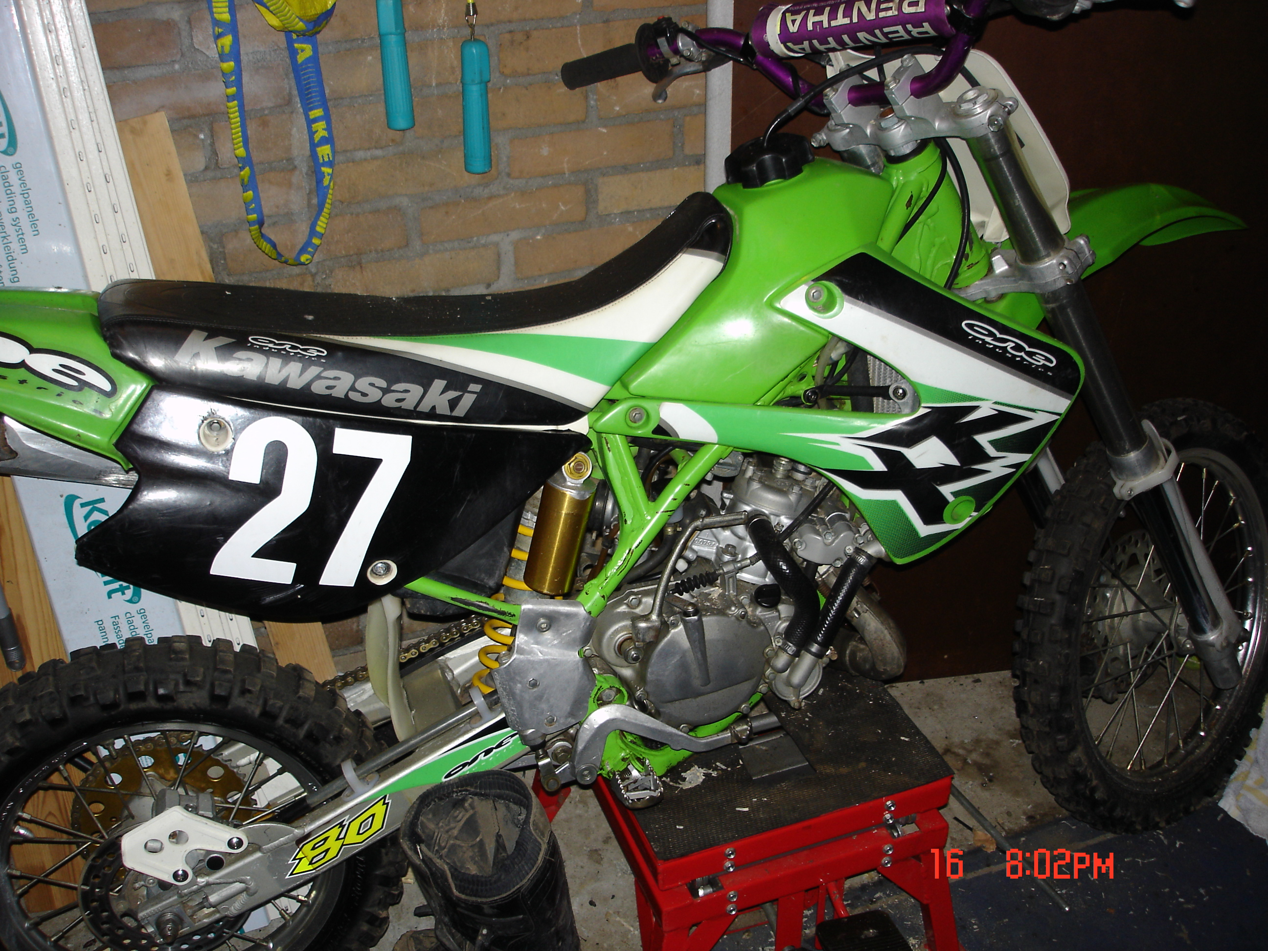 mijn crossmotor